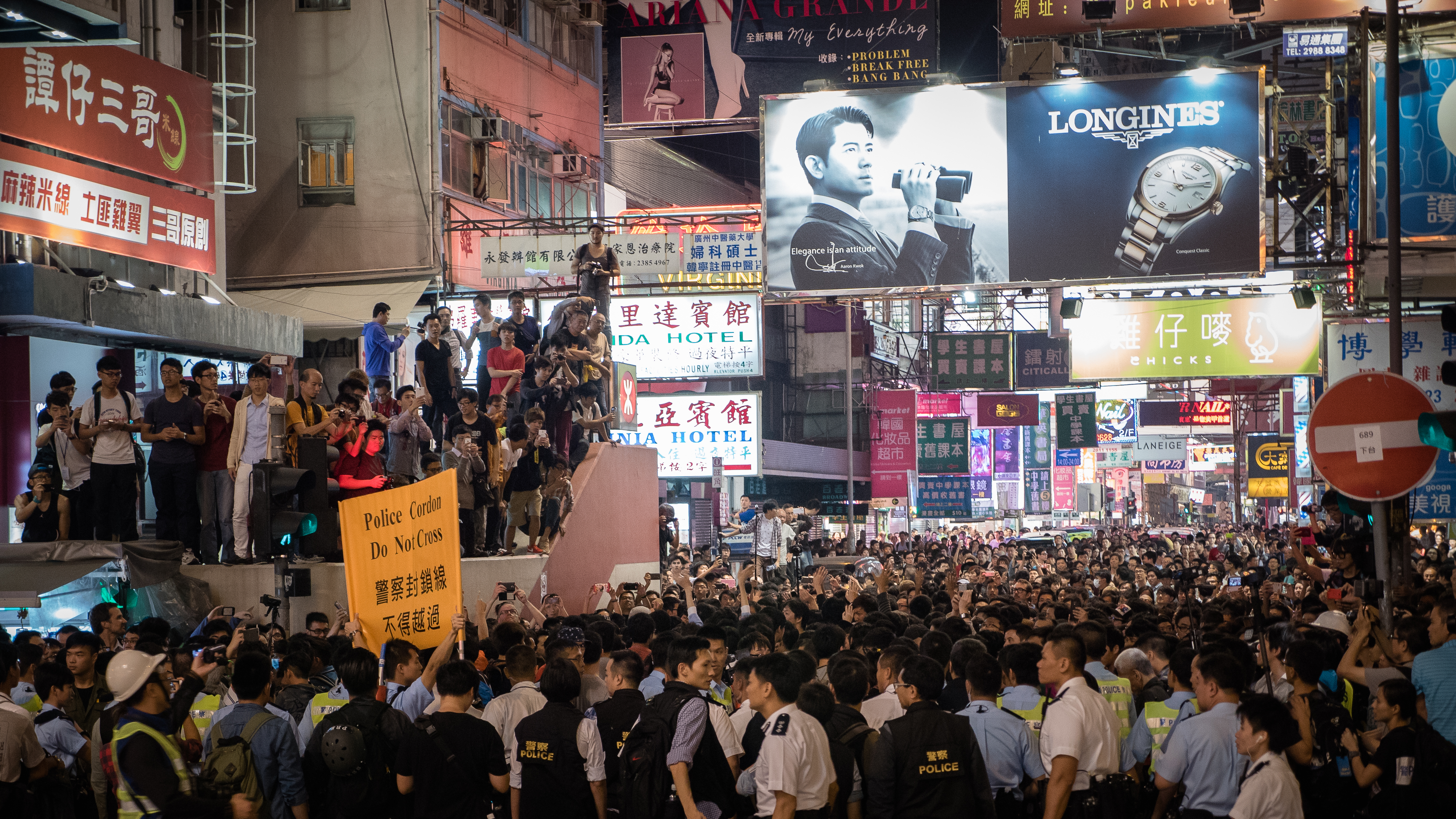 Mong Kok Protest By Katie Brinn